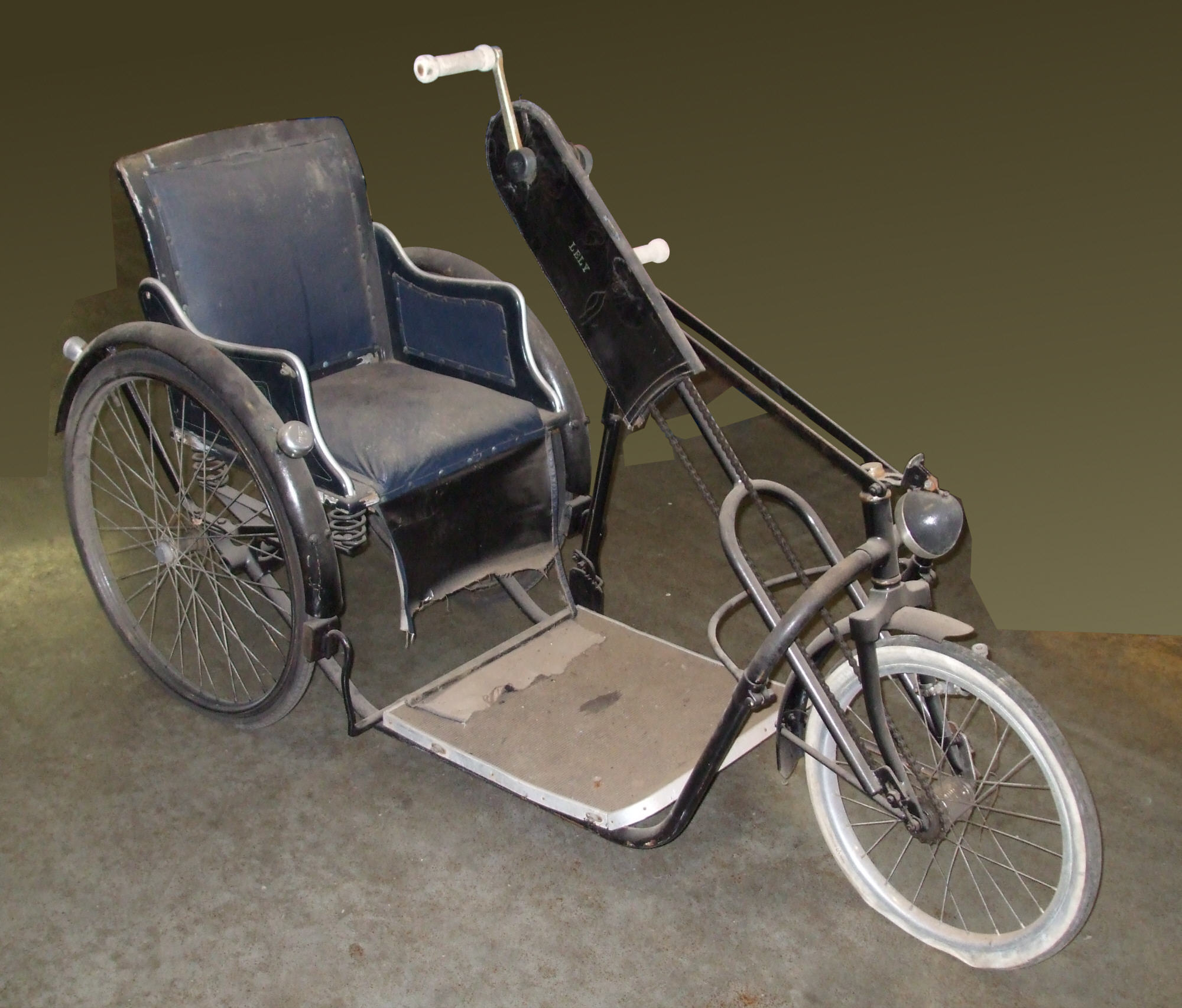 alter Rollstuhl mit Antrieb über Handkurbeln bzw. Muskelkraft, möglicherweise belgisches Modell, da bei der Retro in La Louvière gesehen